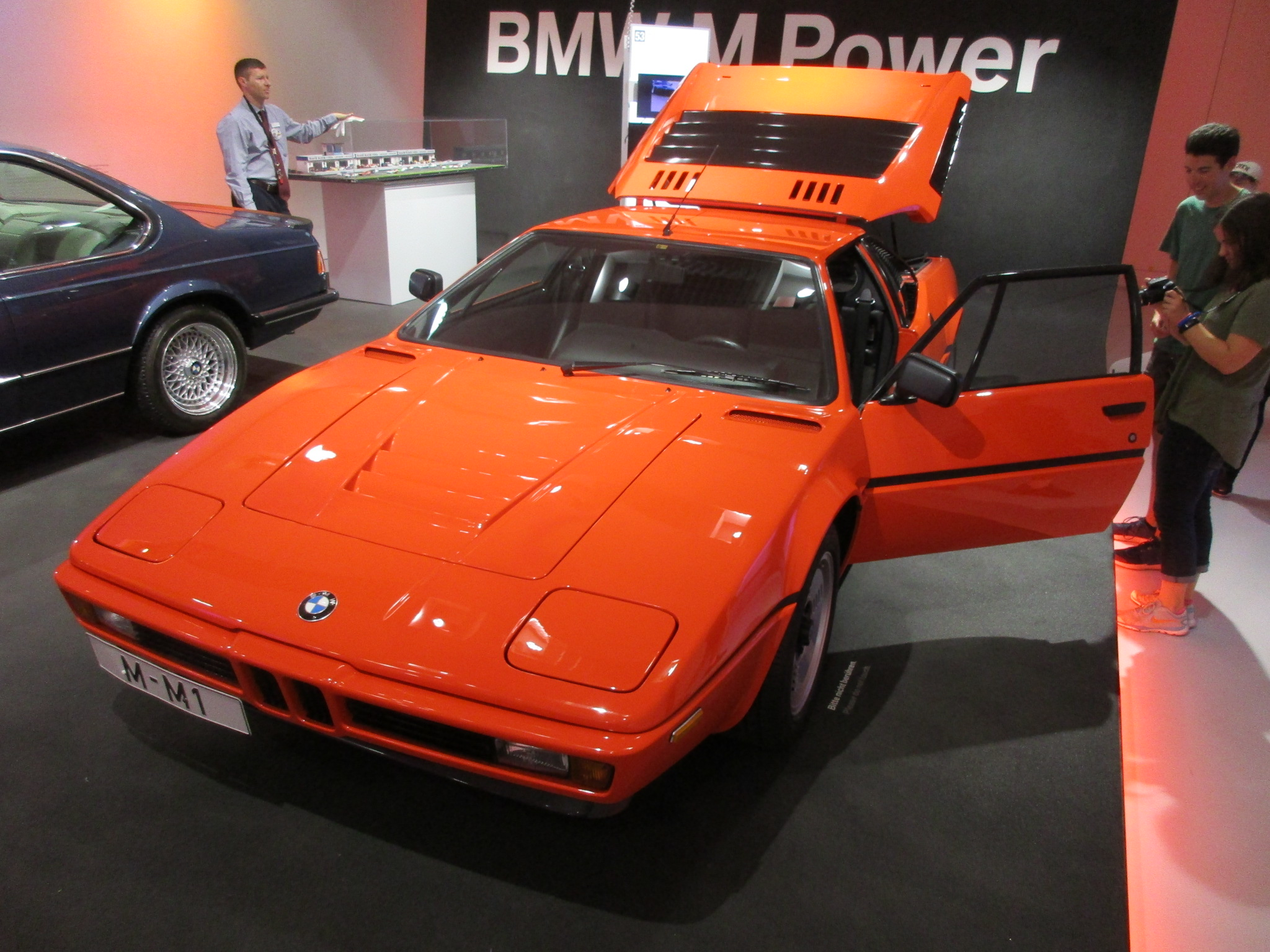 BMW M1 in the BMW-Museum